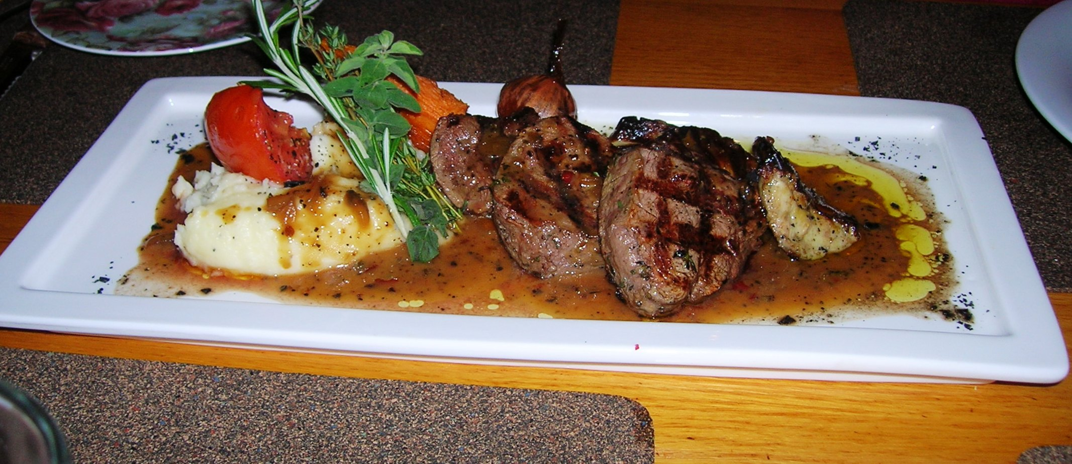 Kimmel Rest